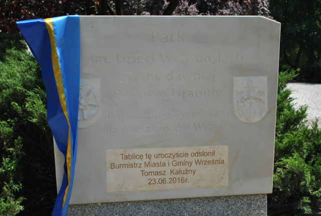 Tablica upamiętniająca przekazanie parku gminie Września.